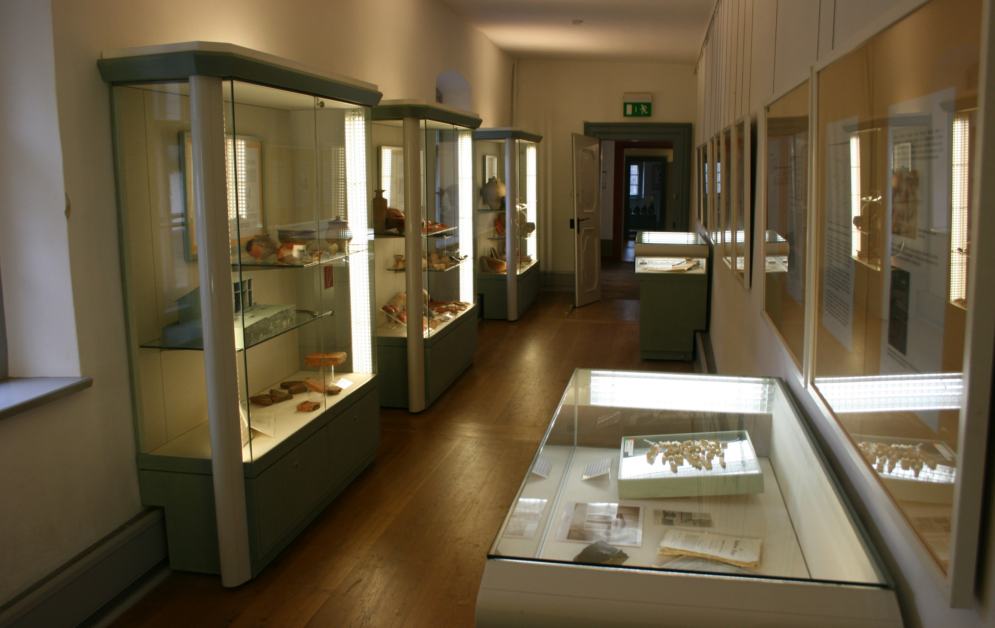 Blick in die römische Abteilung im Landschaftsmuseum Seligenstadt. Mit freundlicher Genehmigung des Museums.